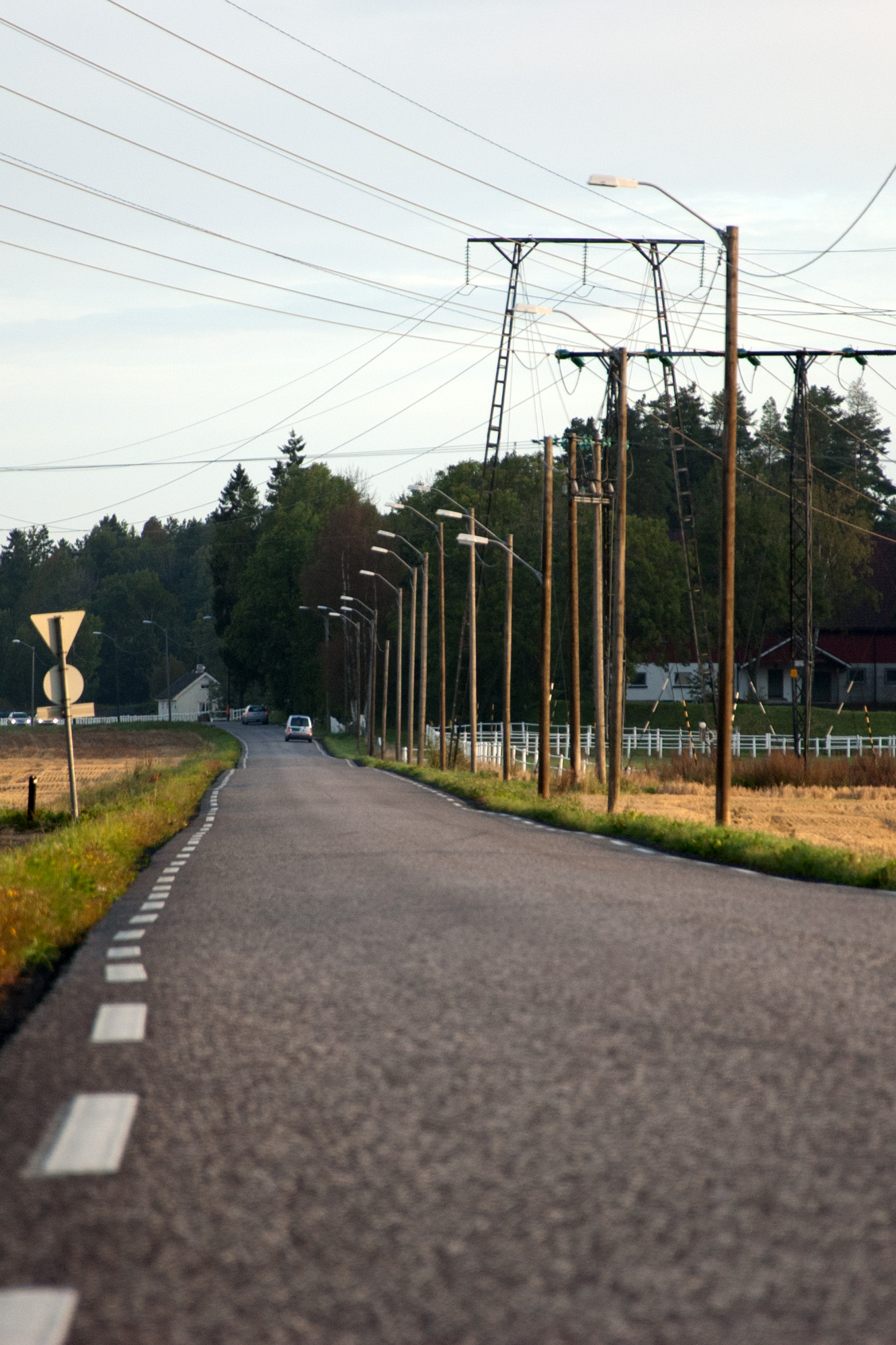 Fylkesvei 530 Adalsveien i Horten, Vestfold